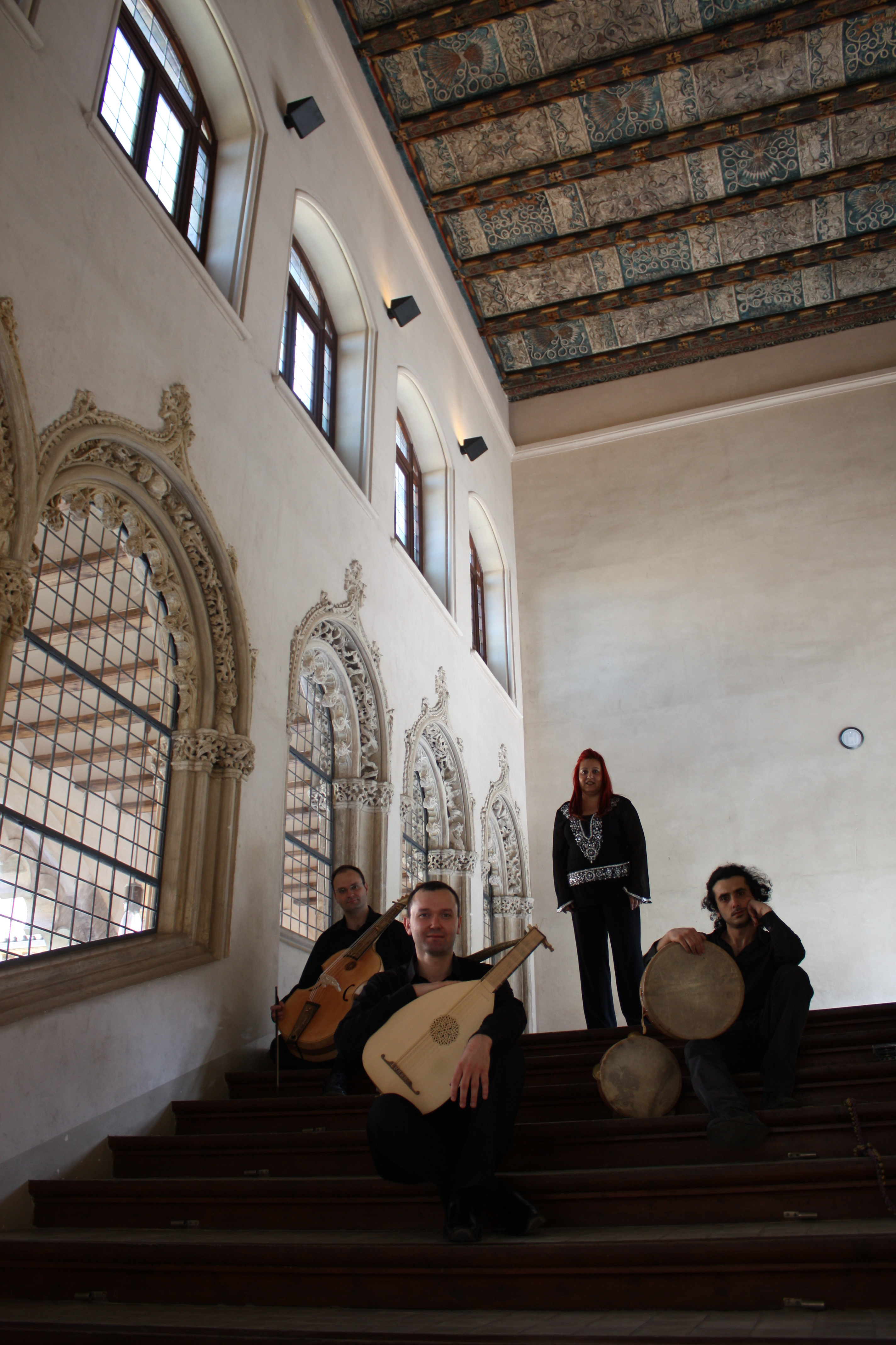 Kalenda Maya